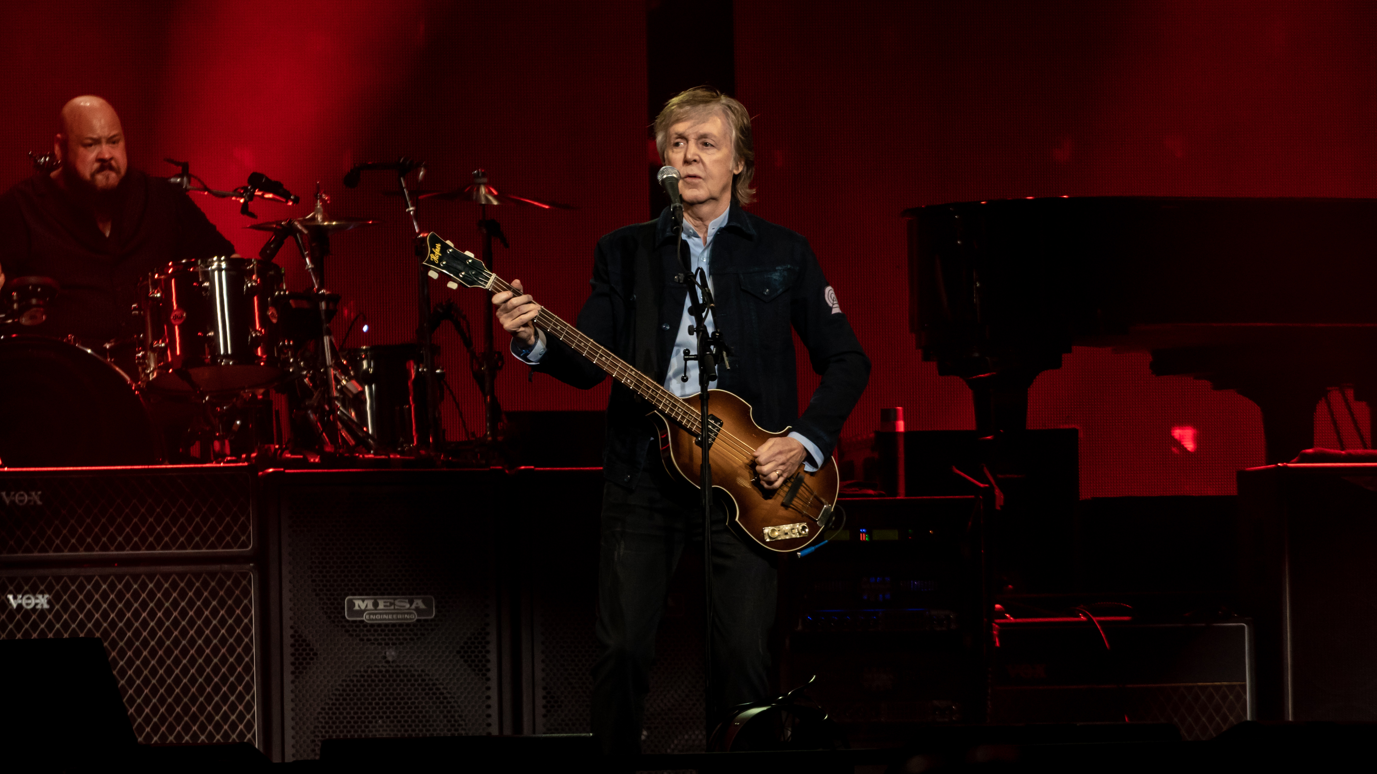 MaccaO2161218-18